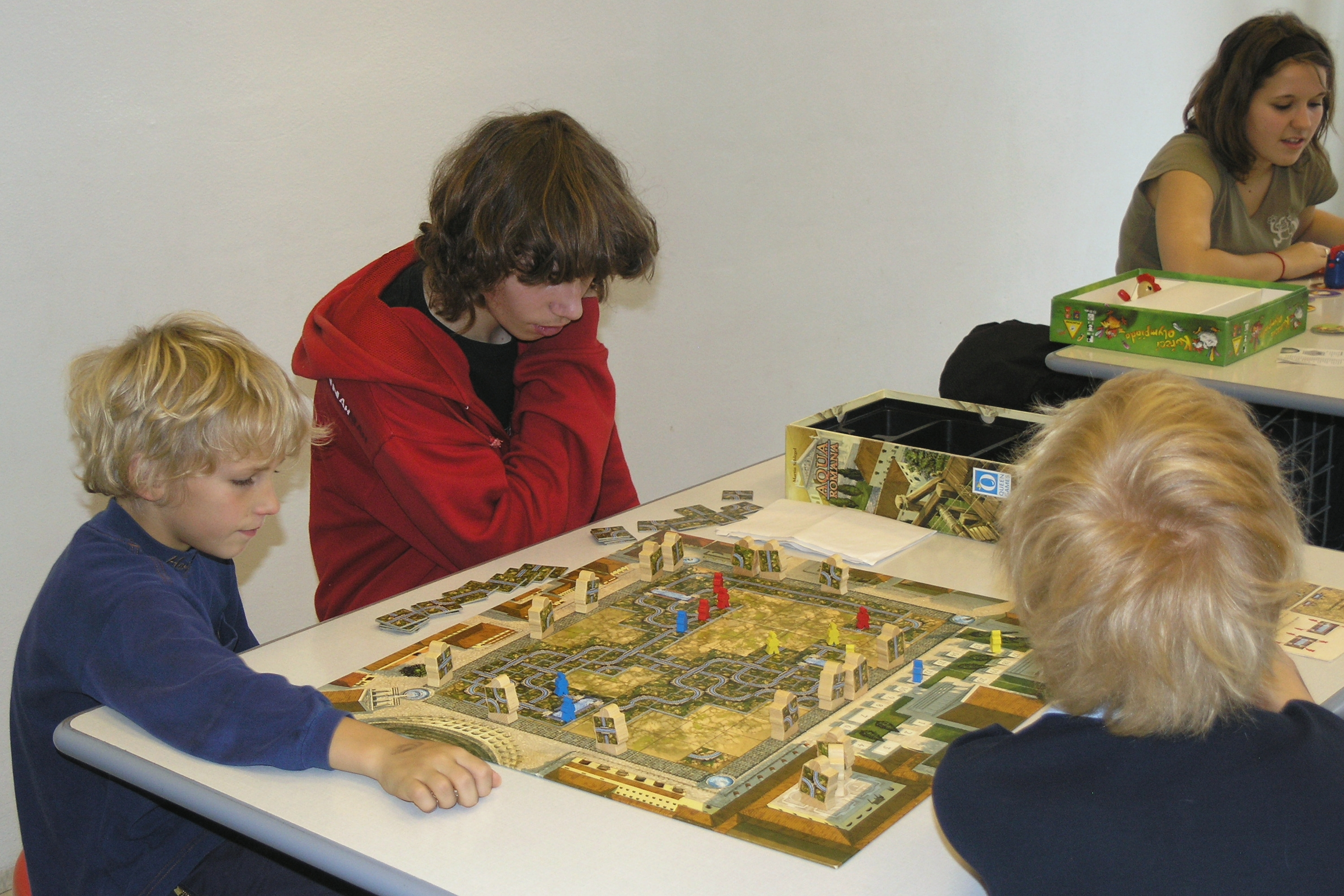 Goliáš a David 2008